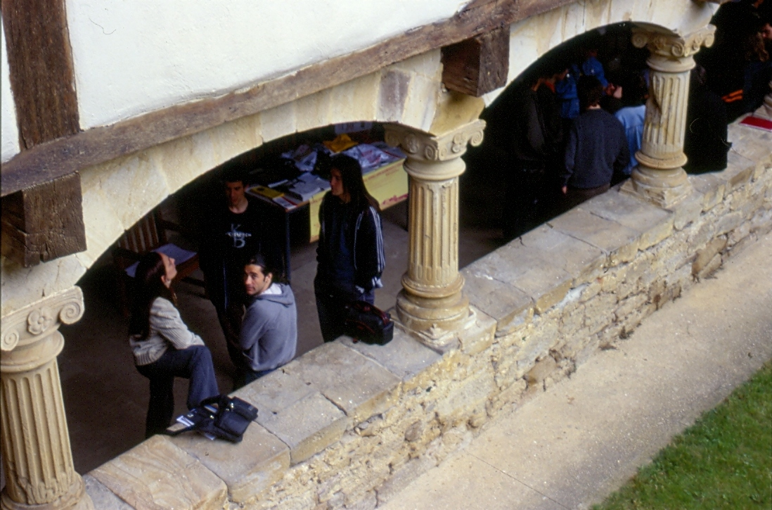 Herria Mugi! ekimenak, Joxemi Zumalabe Fundazioaren laguntzarekin, 2001eko udaberrian Euskal Herriko Herri Mugimenduen III. Topaketak antolatu zituen Barrian (Araba). Ekimen horretako Komunikazio lan taldeak proposatuta, Euskal Herriko irrati batzuk bat deitu ziren helburu zehatz batekin: irratien arteko elkarlana areagotu, eta euren baliabideei probetxu hobea ateratzeko ezer egin ote zitekeen hausnartzea.